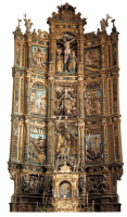 Ezkioko erretaula